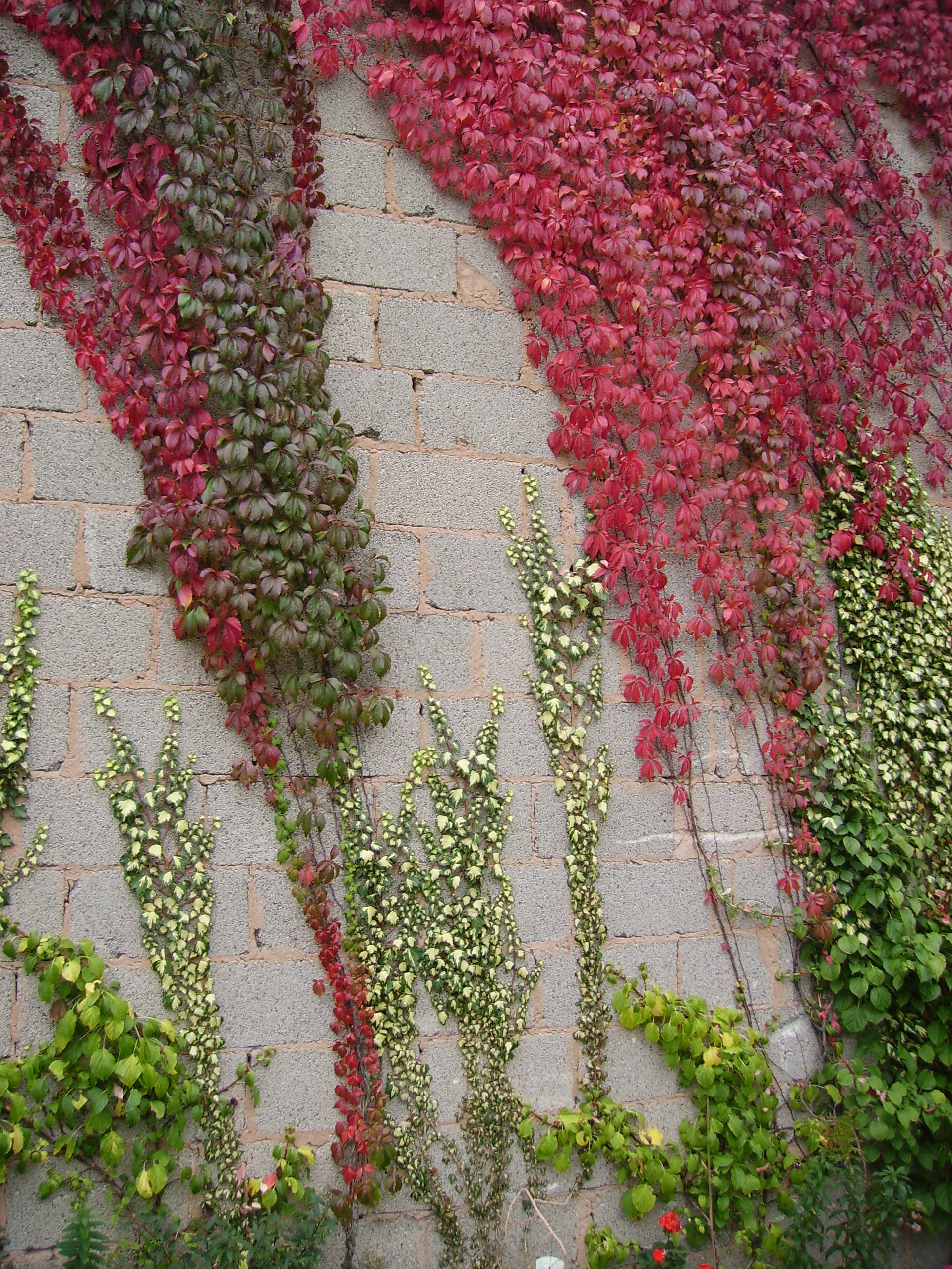 vine in autumn